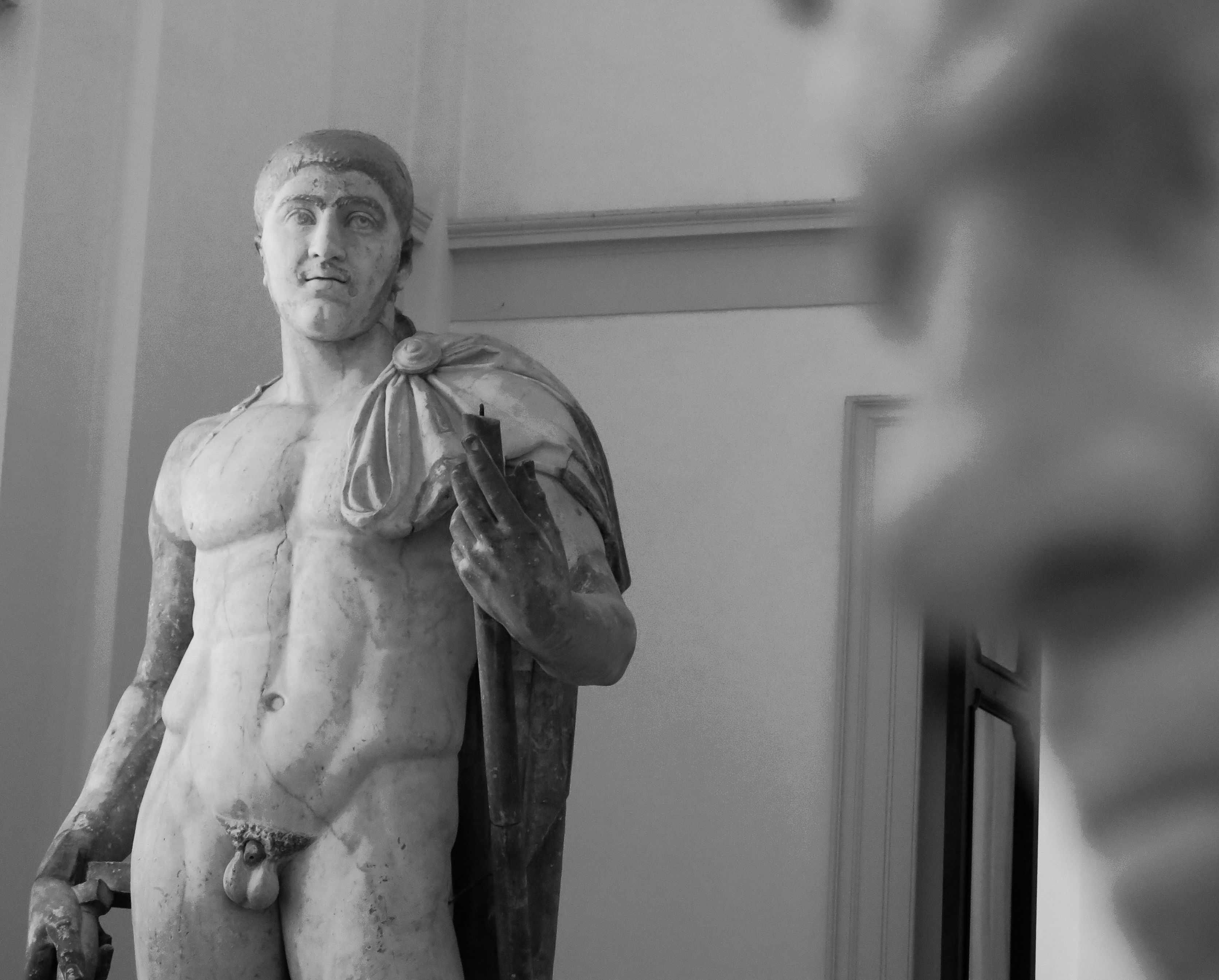 Napoli, museo archeologico